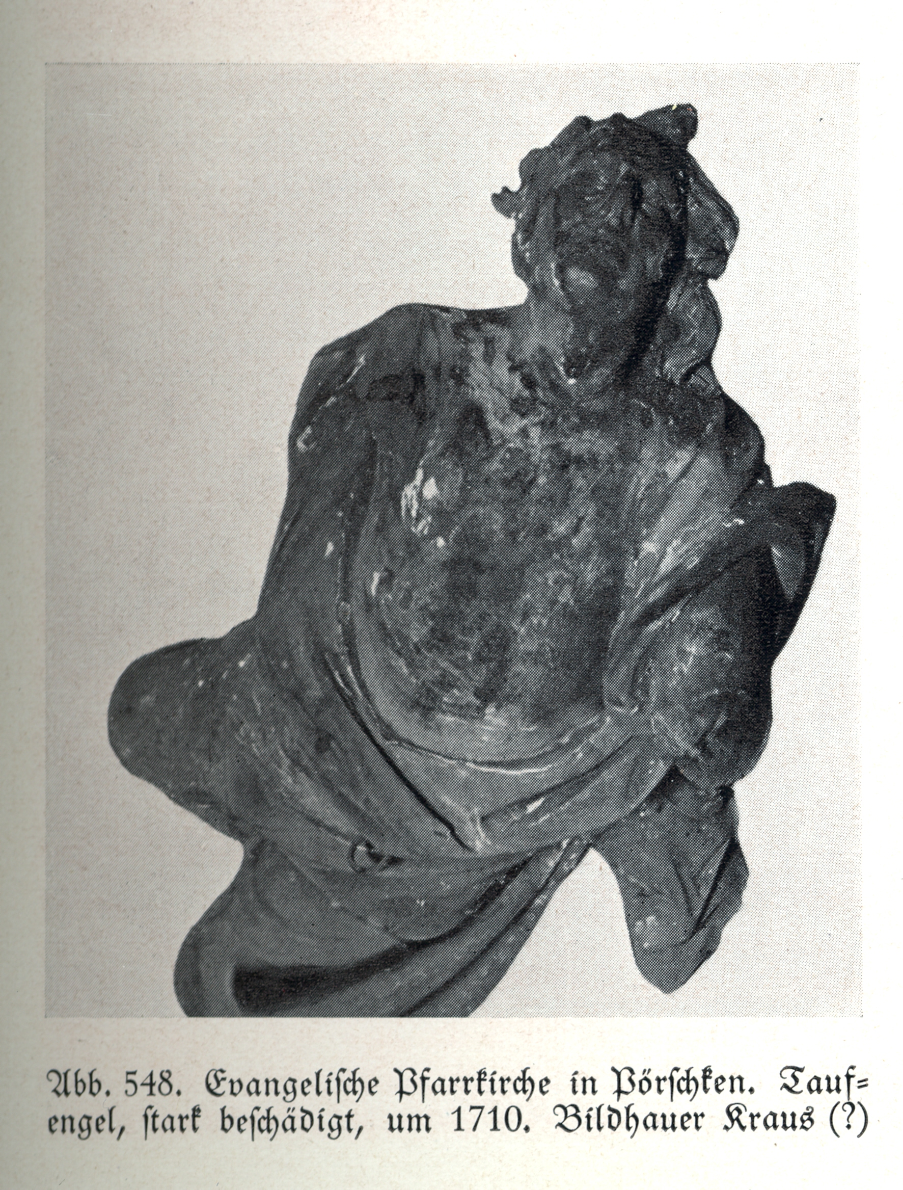 Pörschken, Evangelische Pfarrkirche, Taufengel, um 1710, Bildhauer Joseph Anton Kraus (zugeschrieben)